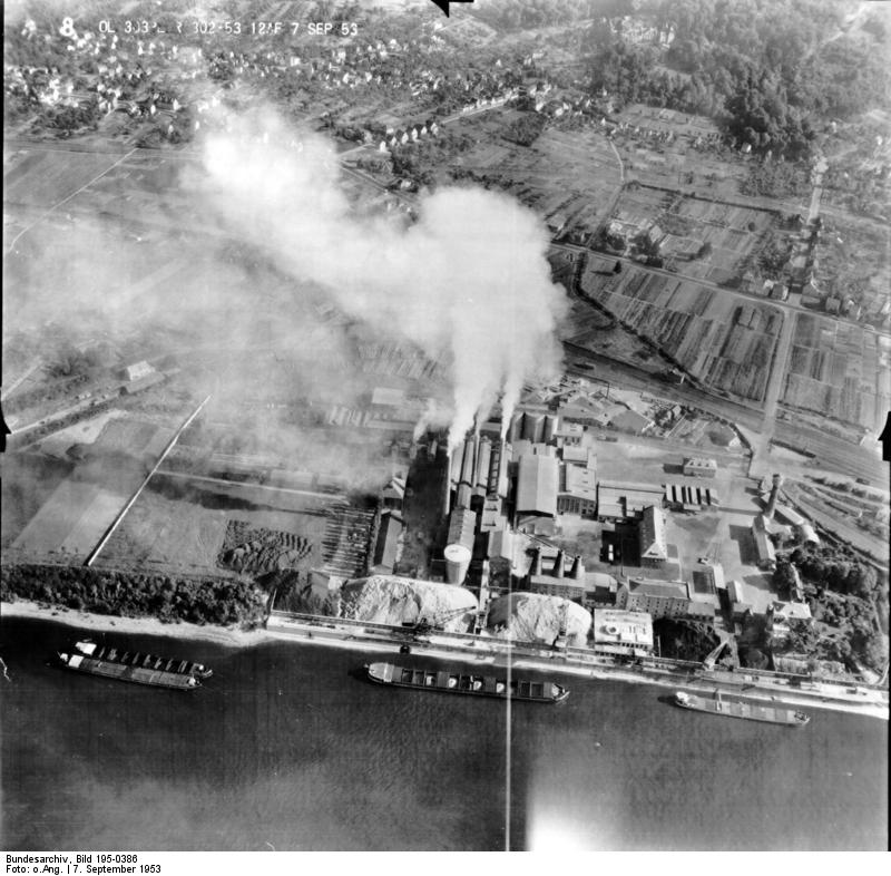 Rheinbefliegung der Alliierten 1953